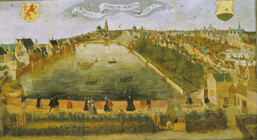 Gezicht op de Hofvijver in Den Haag vanaf de Doelen